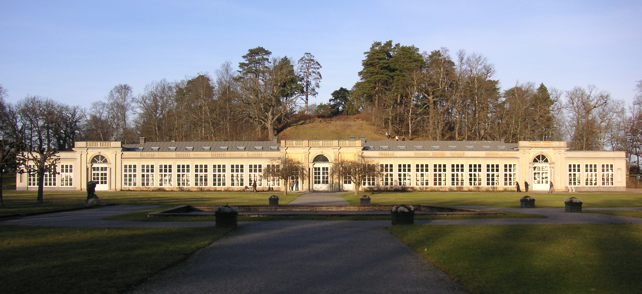 Orangerimuseet på Ulriksdal